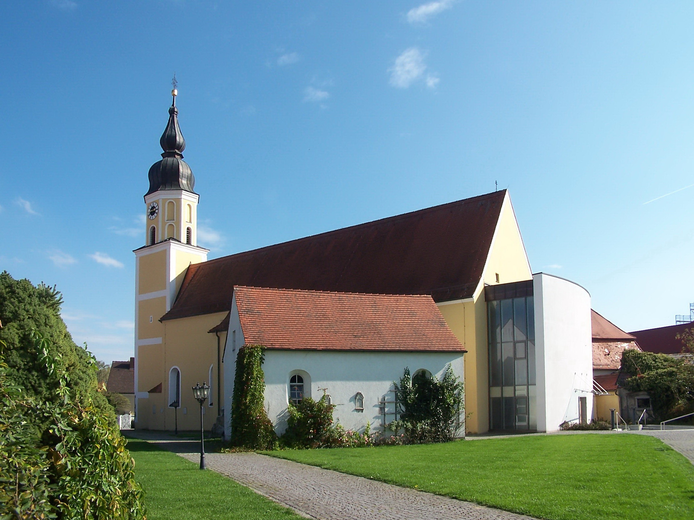 Langquaid Marktplatz 14. Katholische Pfarrkirche St. Jakob d. Ä. Saalkirche mit Steildach, eingezogenem Rechteckchor und Chorscheitelturm, Portalvorhalle nach Süden, Chor und Turm im Kern romanisch, 13. Jahrhundert, Langhaus spätgotisch, 15. Jahrhundert, Barockisierung der Anlage um 1740, Verlängerung nach Westen, 1917; mit Ausstattung; Seelenkapelle, rechteckiger Satteldachbau, 18. Jahrhundert. Friedhofsmauer mit Grabdenkmälern des 17. bis 19. Jahrhunderts.